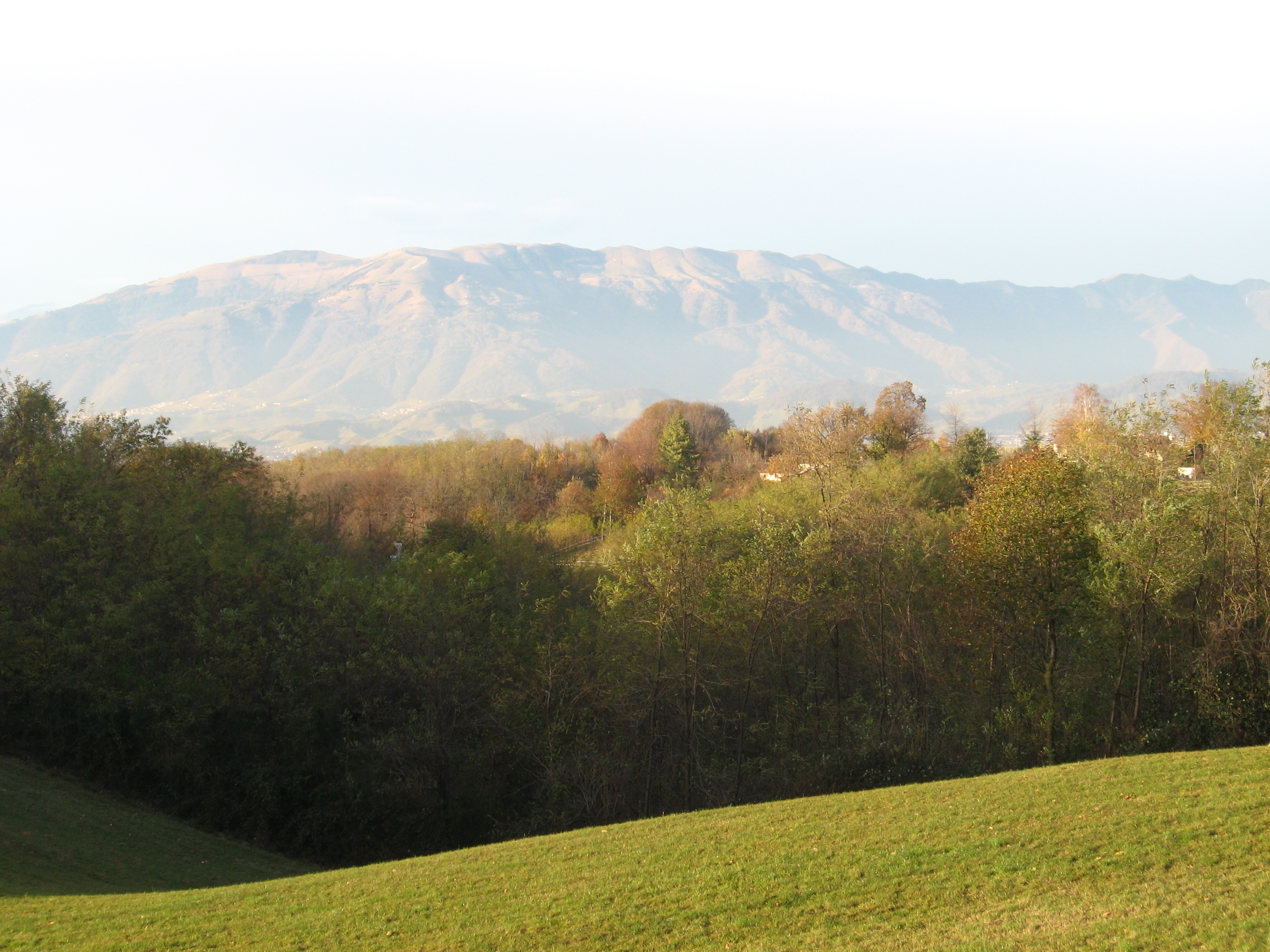 Paesaggio da Santa Maria della Vittoria (Montello) verso le Prealpi che dividono il Trevigiano dal Bellunese.